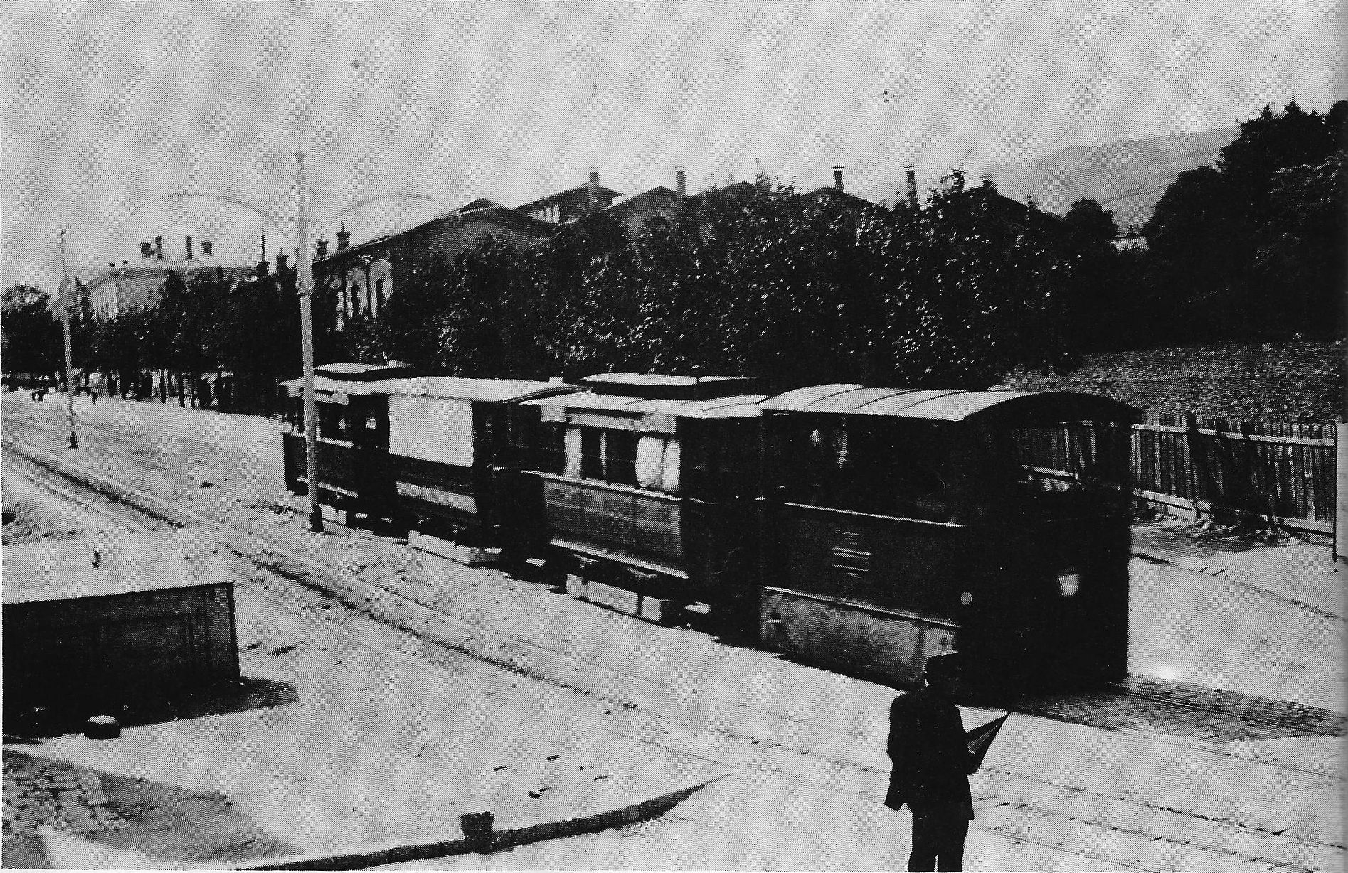 Zug der Neuen Wiener Tramwaygesellschaft in Nussdorf beim Zahnradbahnhof